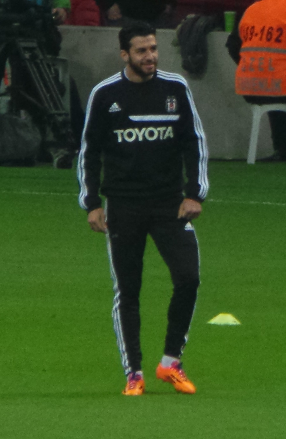 İsmail Köybaşı